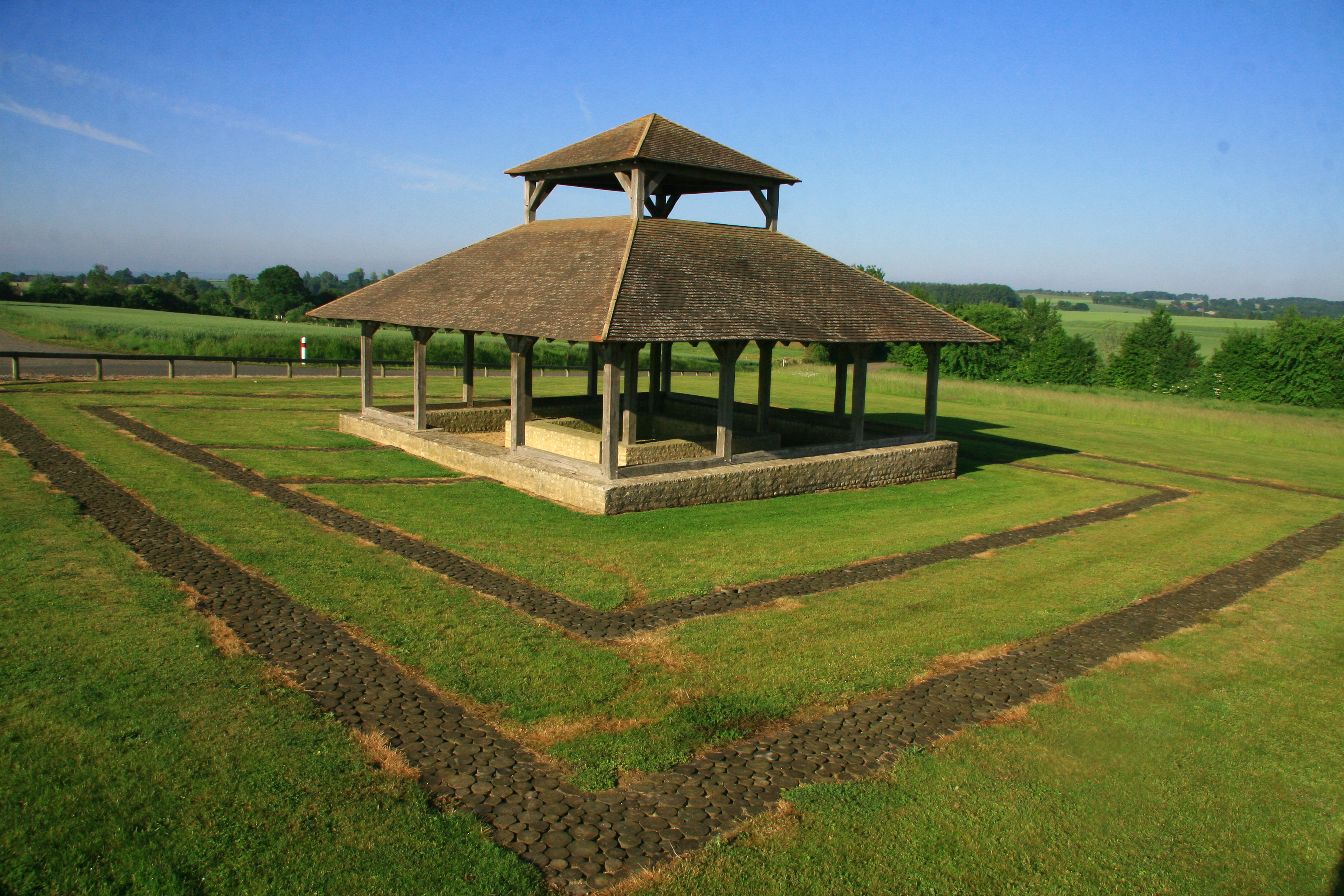 Fanum d'Oisseau-le-Petit, Sarthe, Pays de la Loire, France